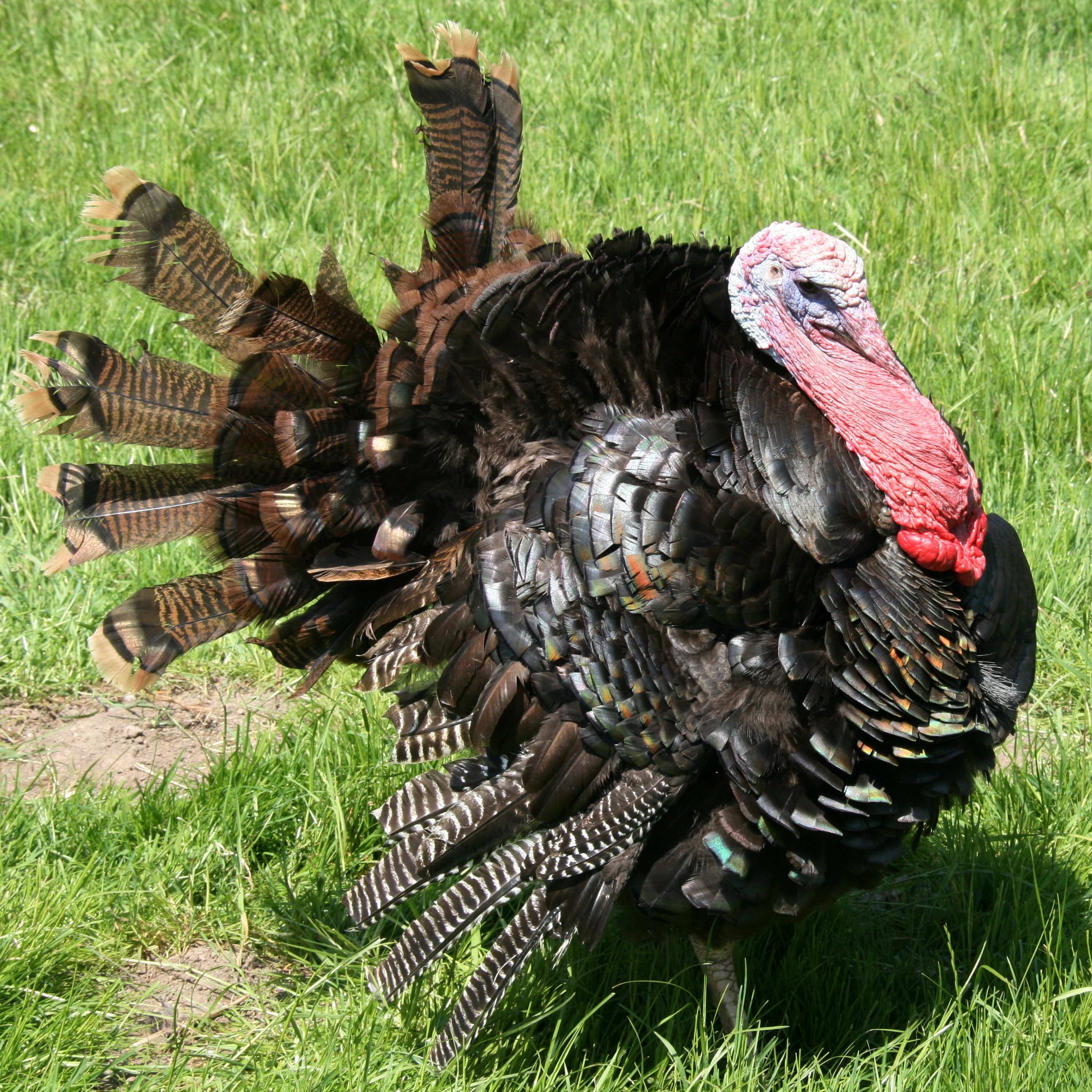 Die Truthühner (Meleagris) hier die Bronzepute sind eine Gattung der Fasanenartigen und gehören zu den Hühnervögeln. Sie bilden allein die gleichnamige Unterfamilie (Meleagridinae).